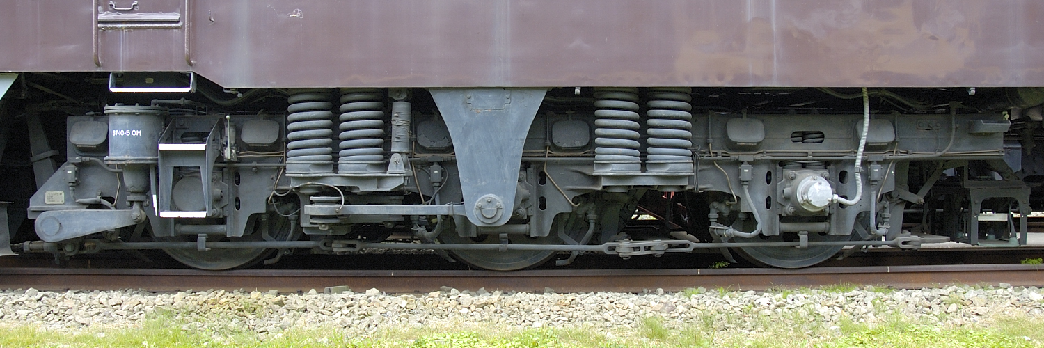 日本国有鉄道（国鉄）所属 EF62形電気機関車 (EF62 1) のDT124形台車